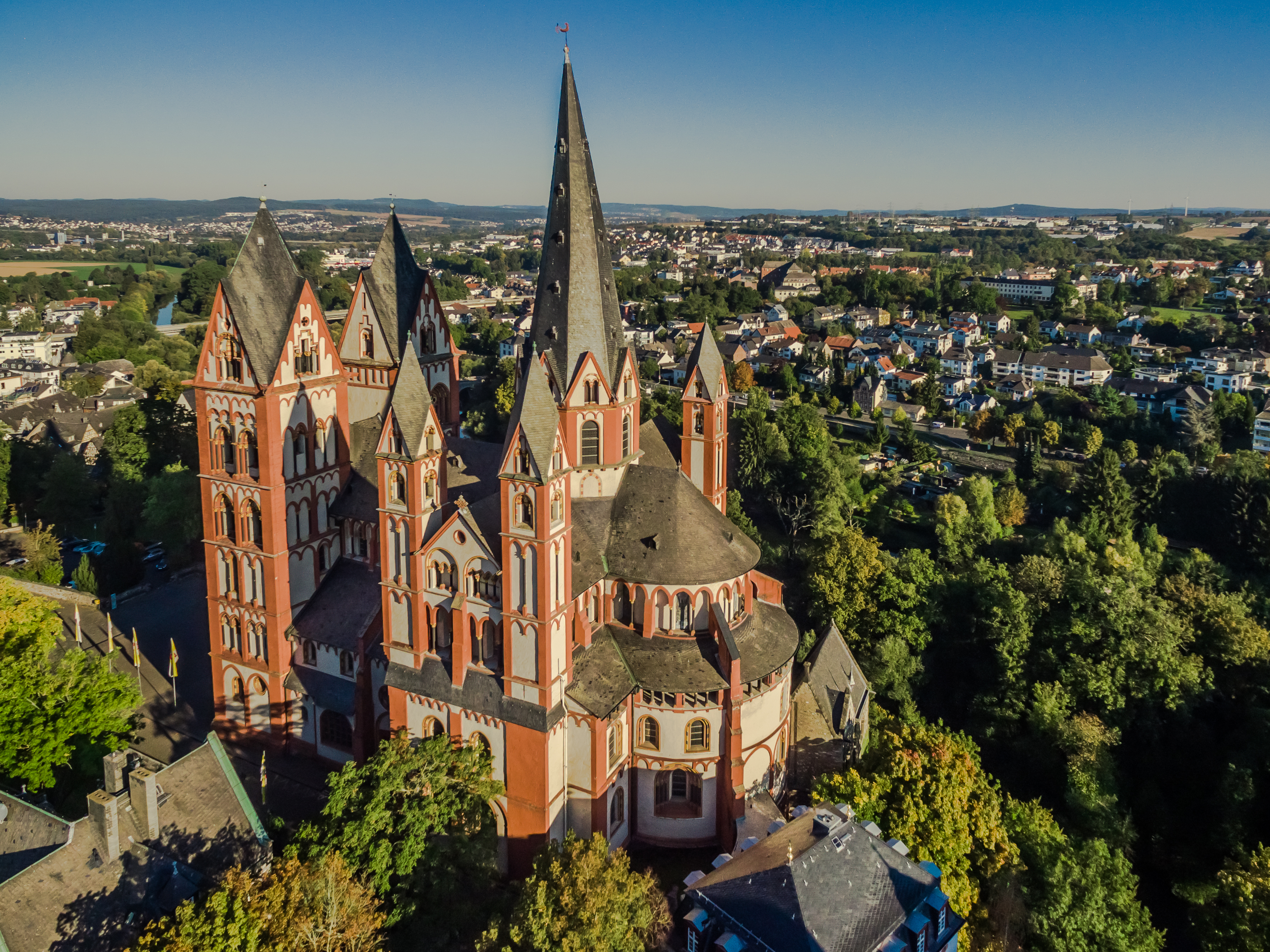 Luftaufnahme des Limburger Doms